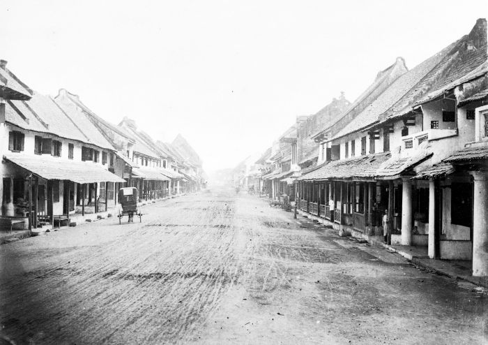 Foto. Album beslaat souvenir foto's van Java. Een straat in Batavia